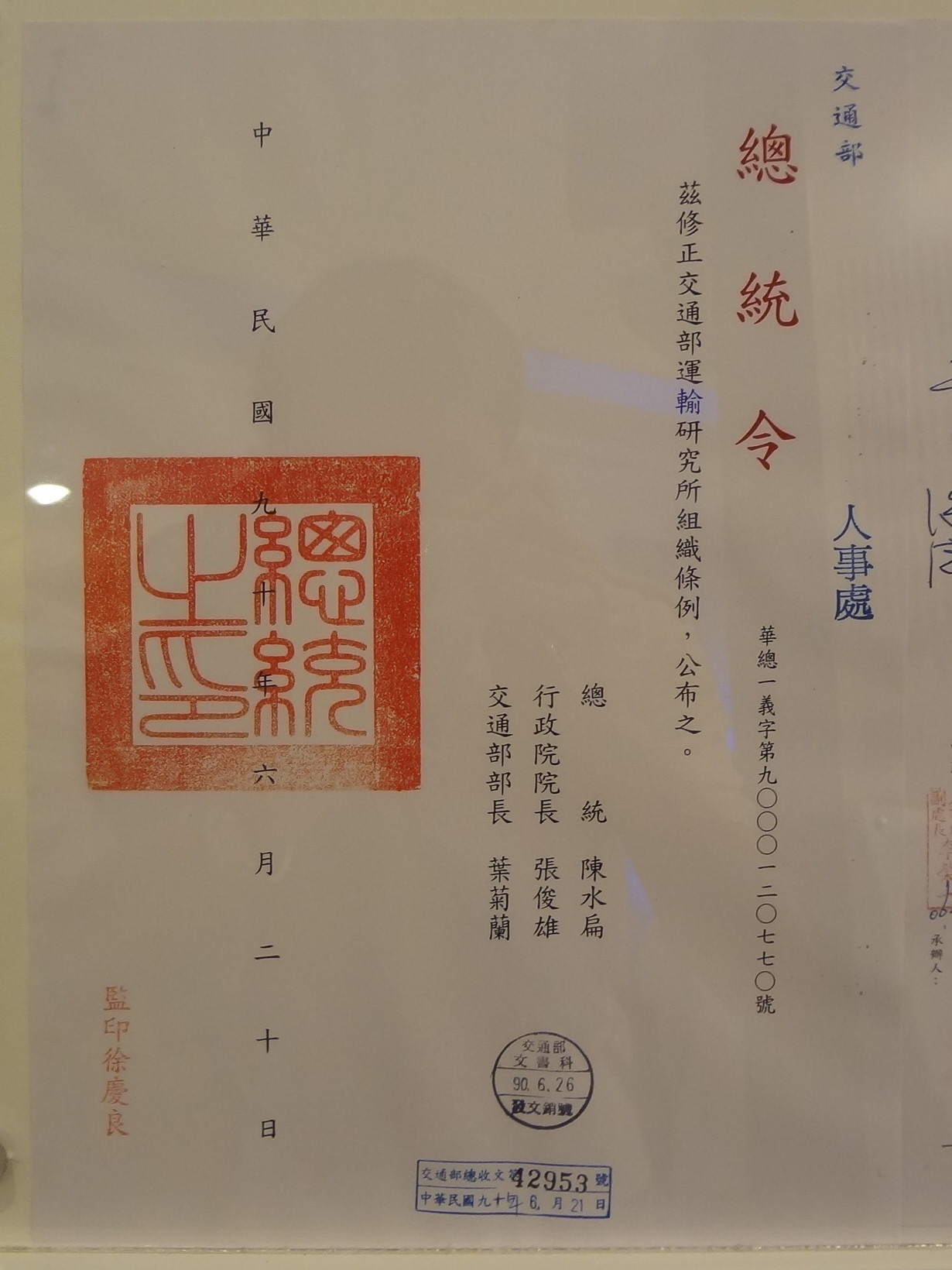 2001年（中華民國90年）6月20日，中華民國總統陳水扁發布總統令，修正公布《交通部運輸研究所組織條例》。左方蓋印總統之印。